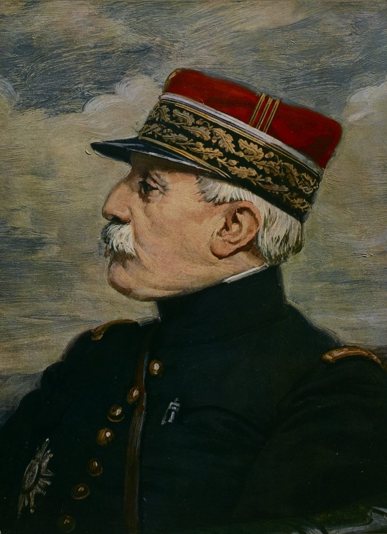 Recueil. Portraits d'Édouard de Curières de Castelnau